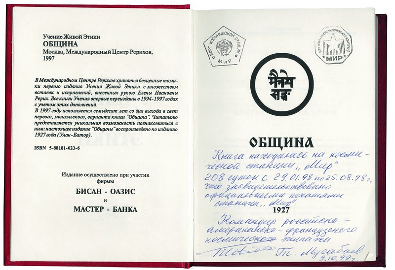 Одна из книг Живой Этики ("Община"), которая находилась на борту космической станции "Мир". В настоящее время книга является экспонатом Музея имени Н.К.Рериха (Москва)